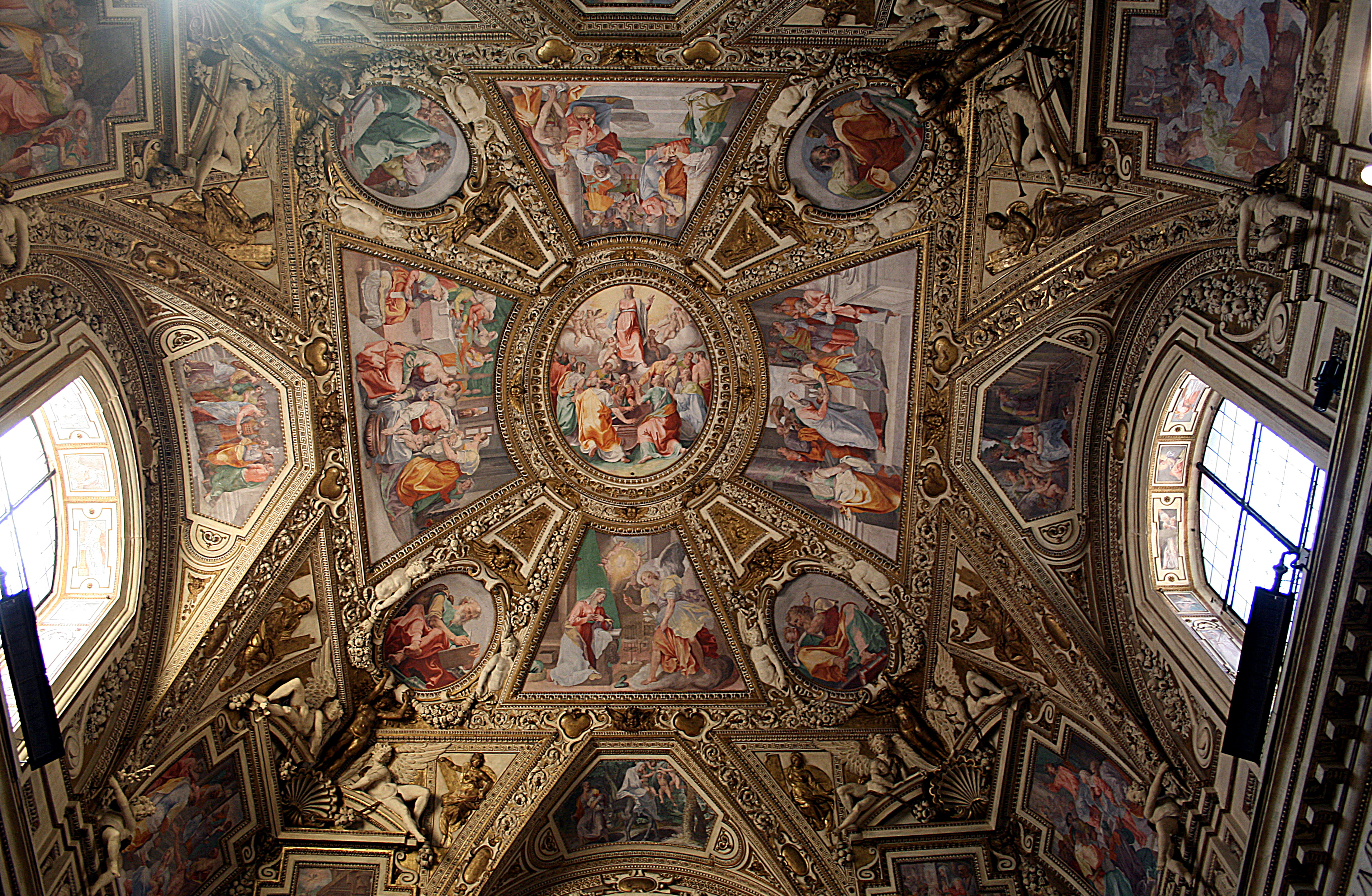 Fresques de la cappella Altemps, œuvres réalisées en 1589 par Pasquale Cati dans la Basilica di Santa Maria in Trastevere à Rome (Italie).